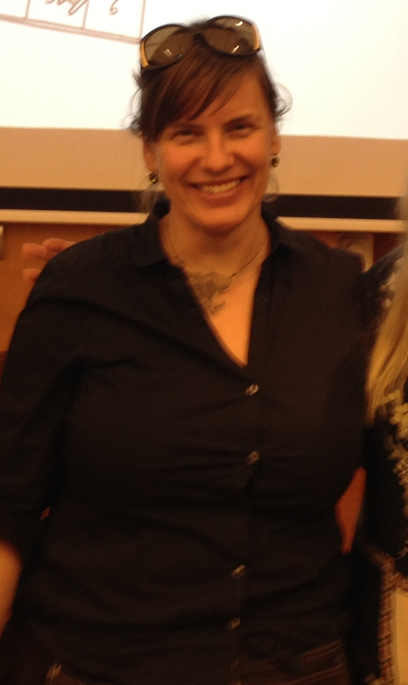 Lovisa Lesse, illustratör, nov 2017